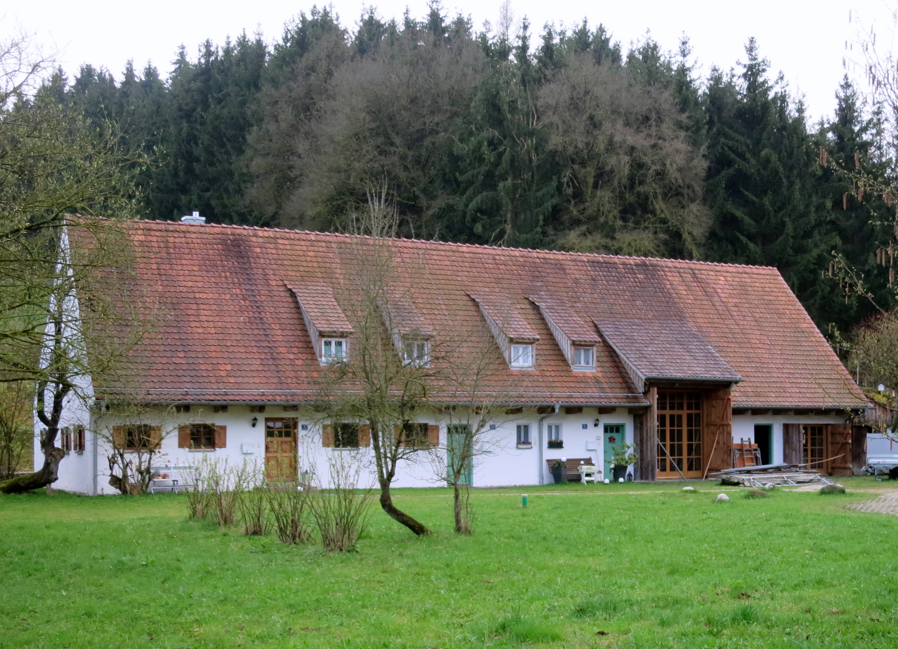 Dieses ehemalige Bauernhaus ist renoviert und bewohnt.